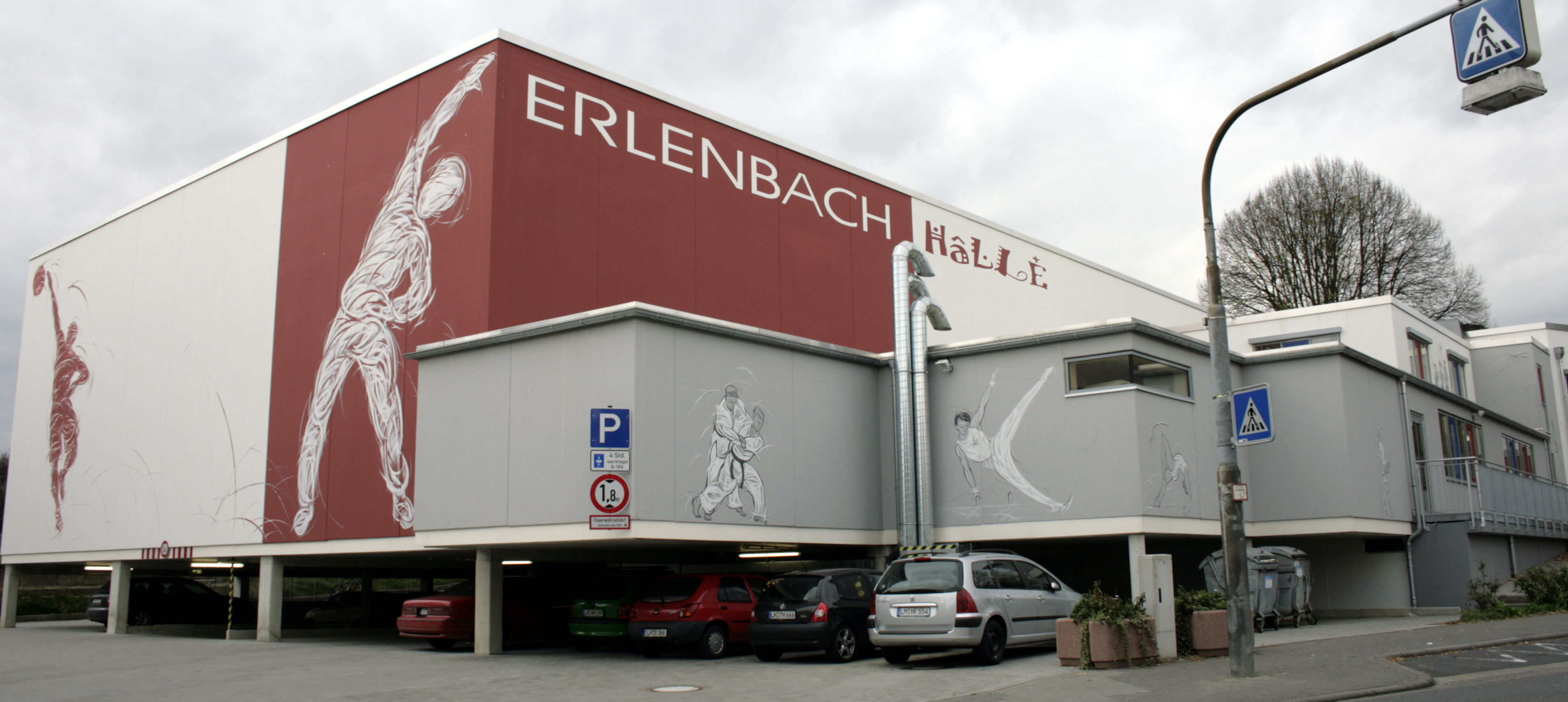 Sporthalle Erlenbachhalle in Elz, Deutschland